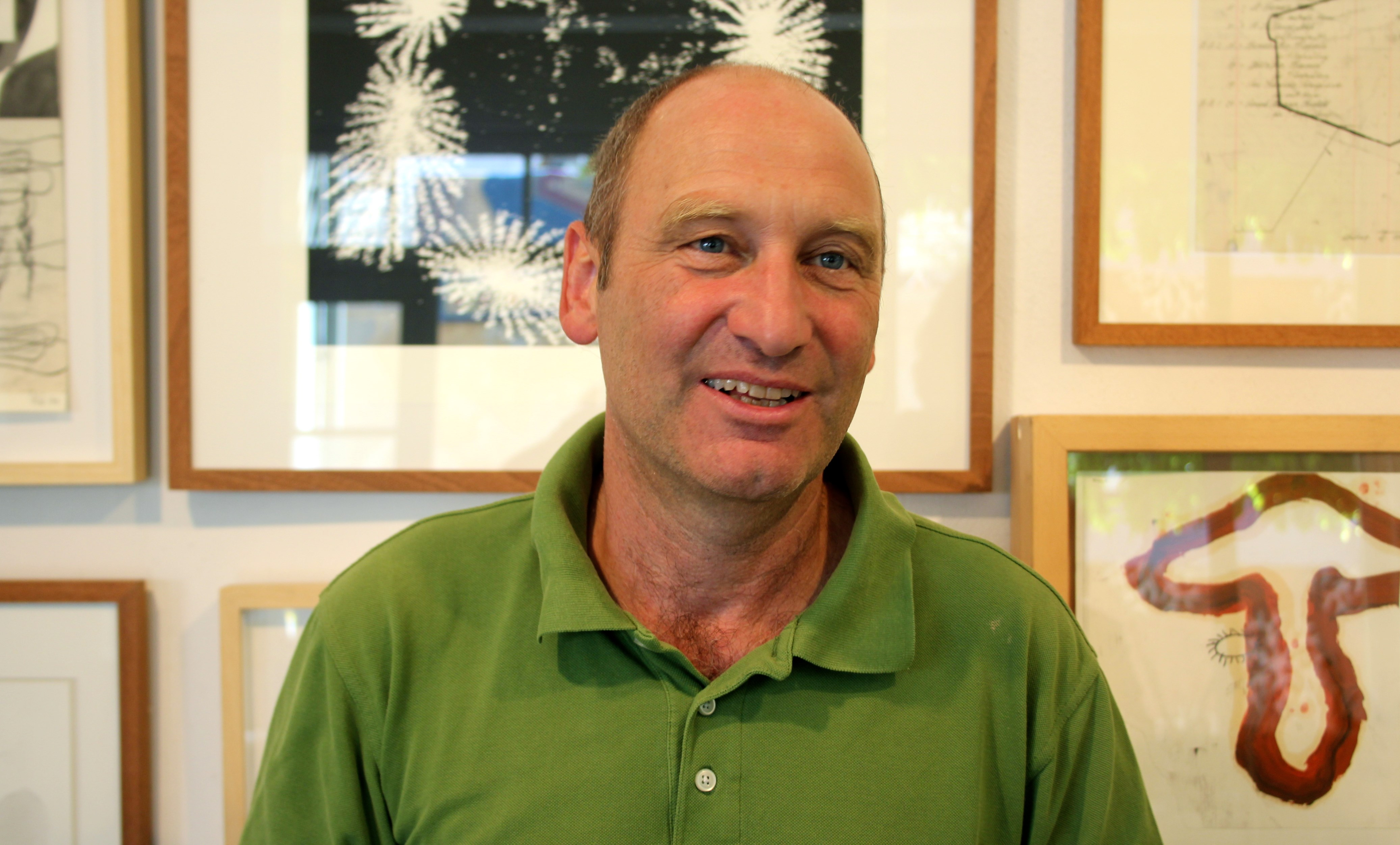 Porträt des Künstlers in seinem Atelier